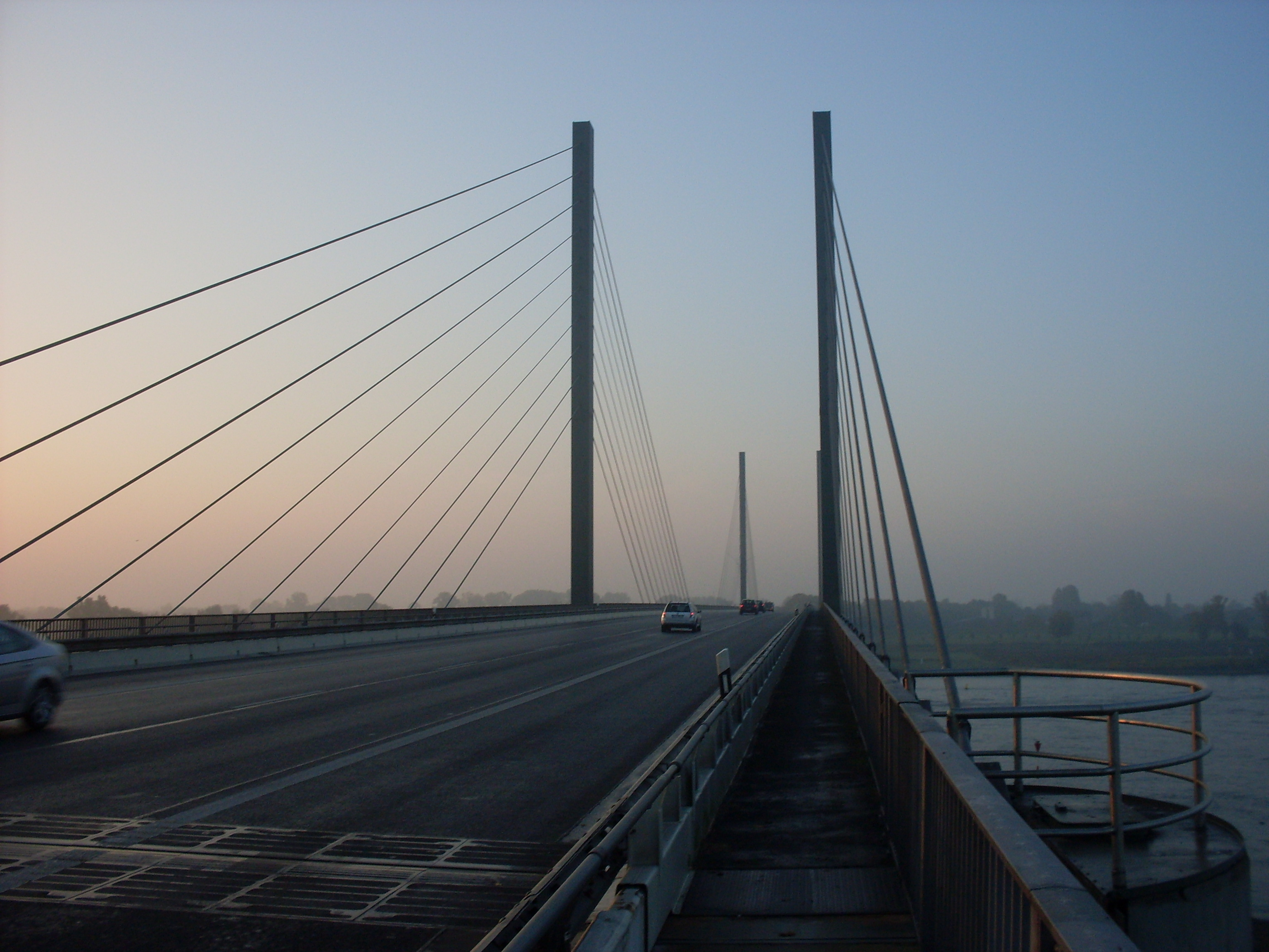 Brugdek